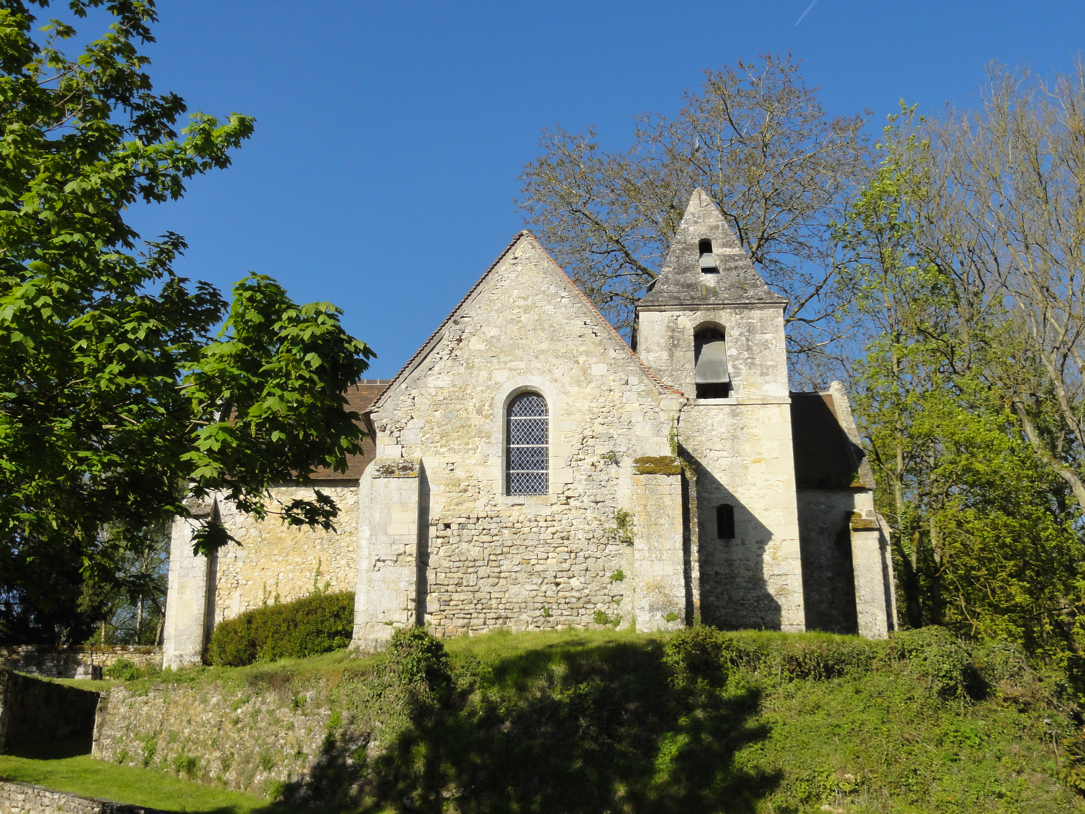 Église Saint-Georges de Bray - voir titre.